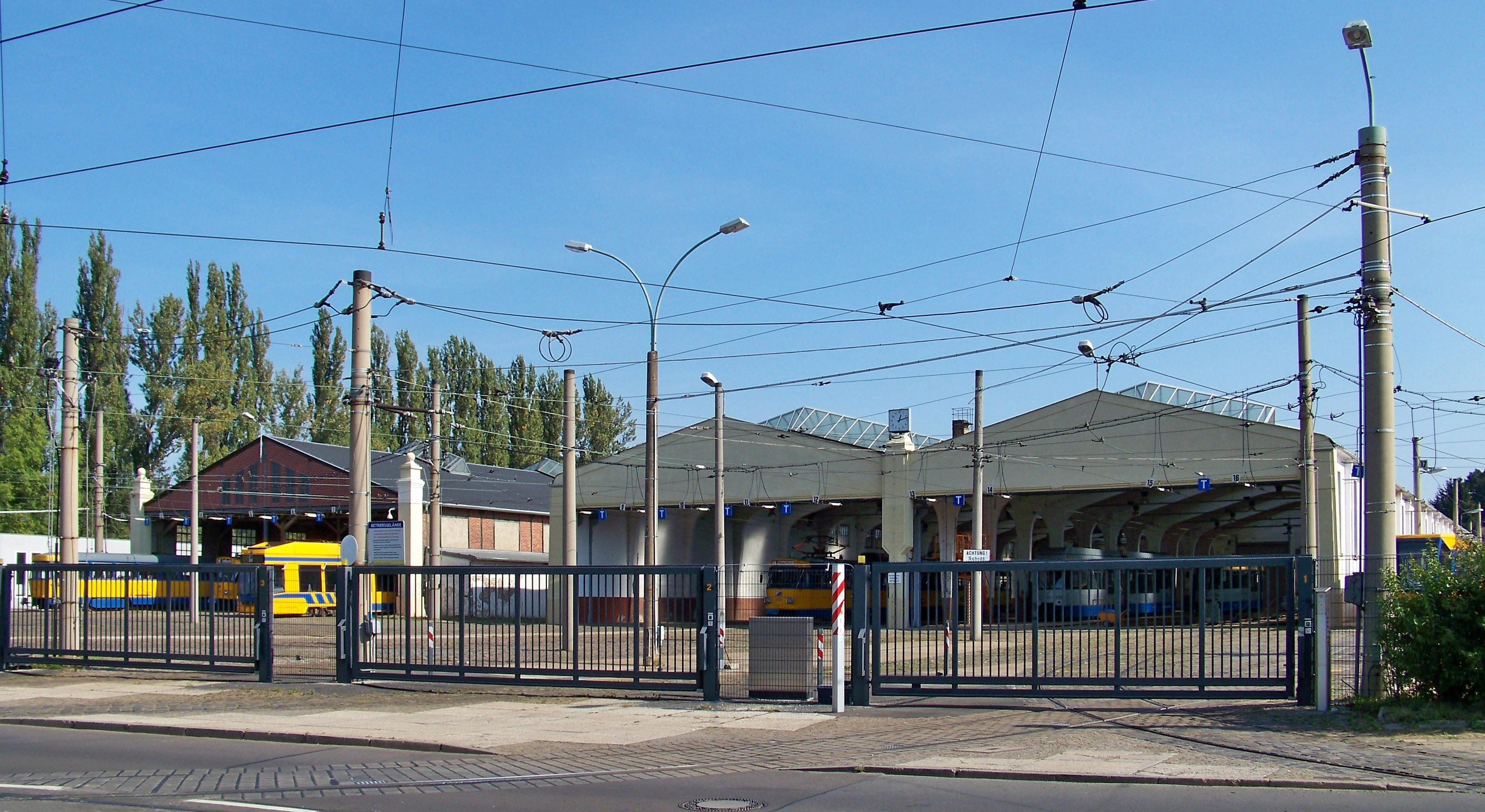 Straßenbahnhof Dölitz in der Bornaischen Straße in Leipzig